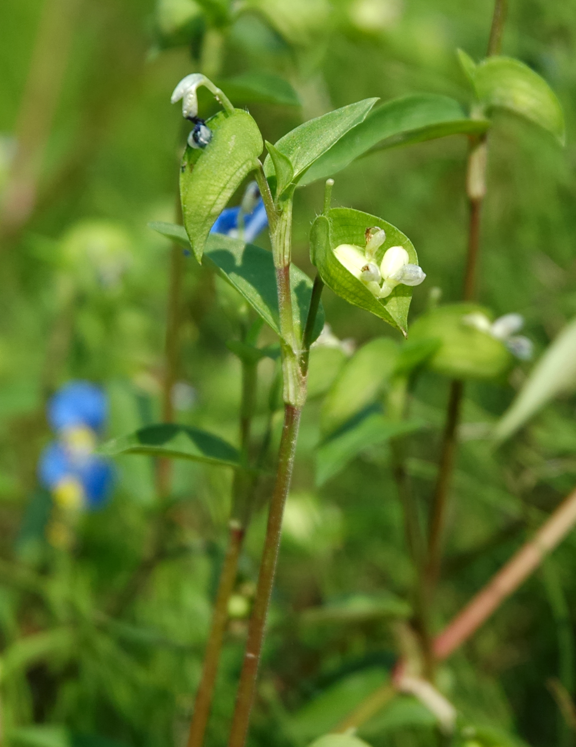 Commelina communis (ツユクサ)